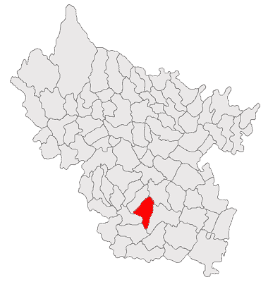 Categorie:Hărţi ale judeţului Buzău